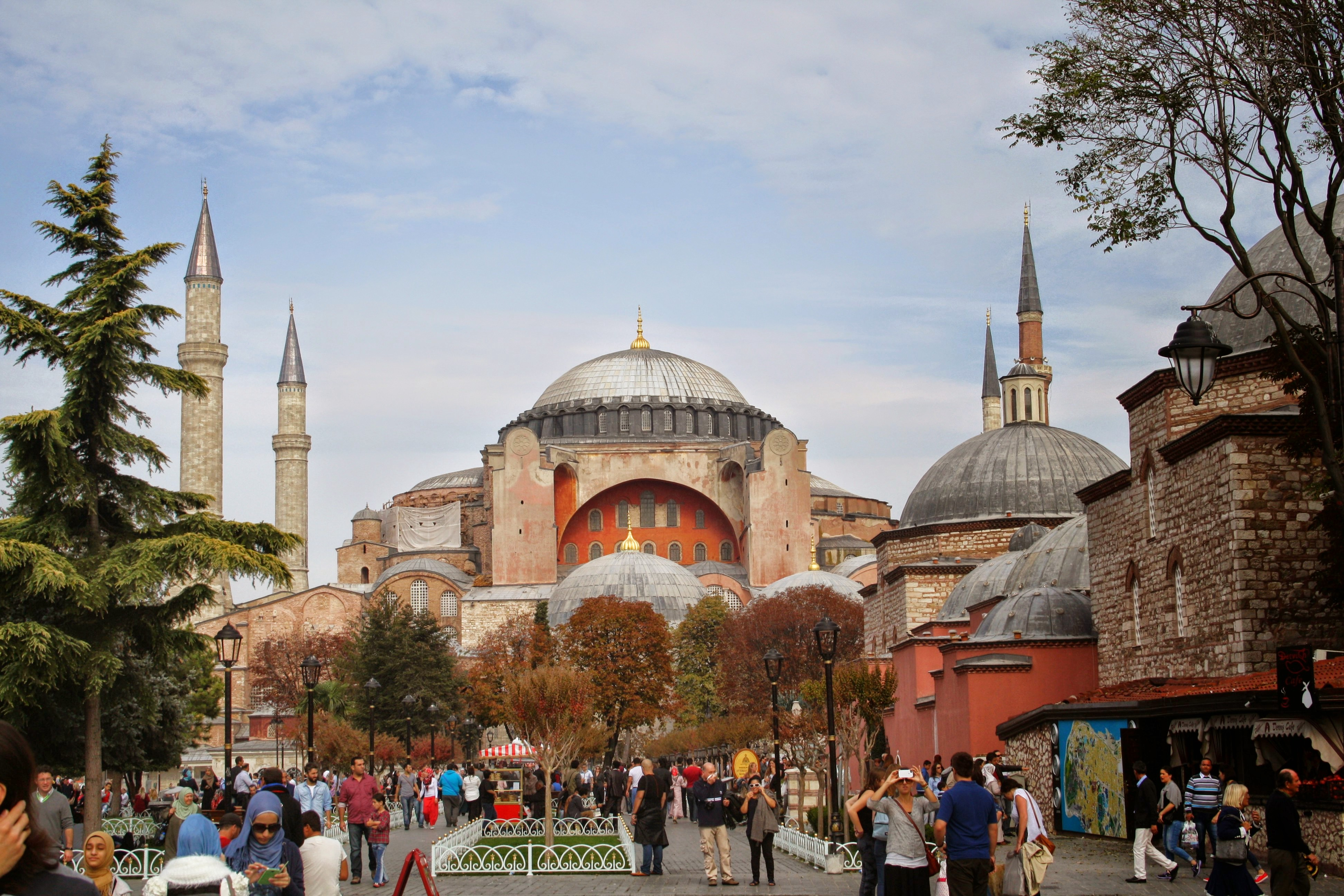 Aya Sofya-İstanbul